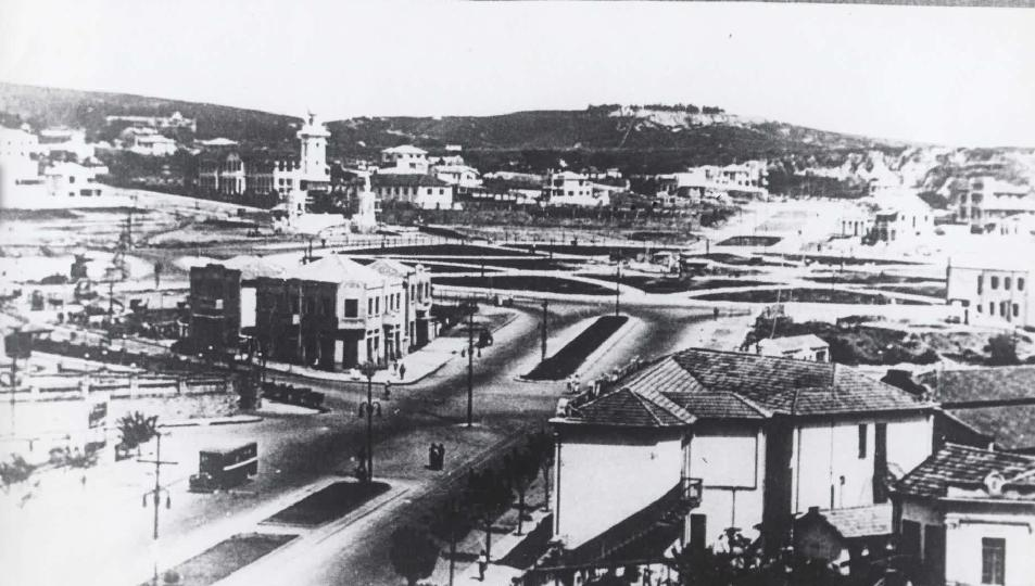 Pça. Raul Soares e Avenida Amazonas, no início do séc. XX